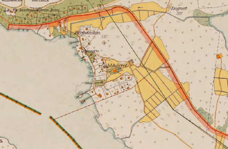 Gubbkärret på Karta "Äppelviken" från 1917-1933